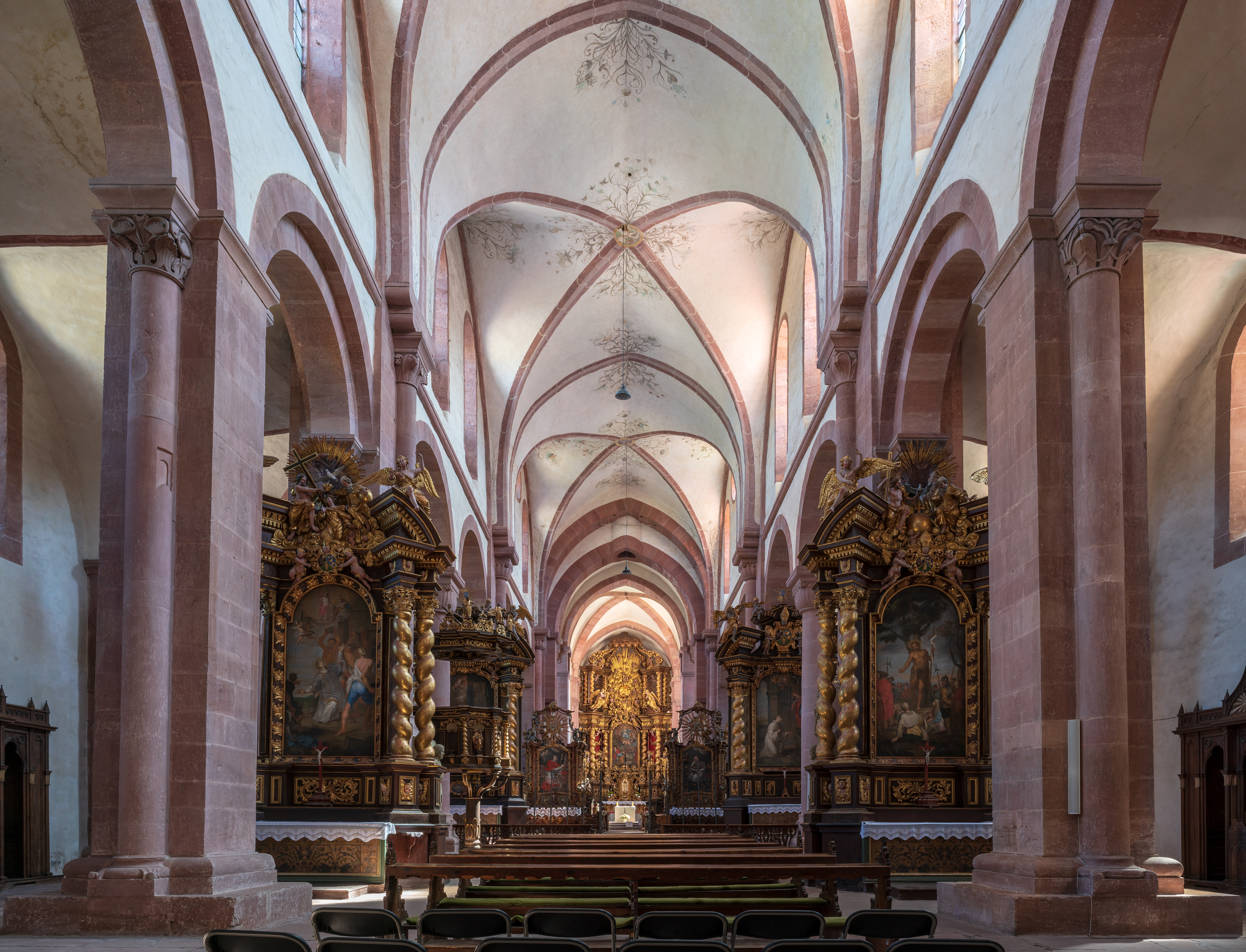 Kloster Bronnbach im Taubertal (bei Wertheim): Innenansicht der Klosterkirche mit Blick durch das Langhaus nach Osten. Kennzeichnend für die Klosterkirche ist die Verbindung von – teils eigenwilligen – romanischen Bauformen mit barocker Ausstattung. Aus dieser Perspektive sieht man, dass die barocken Seitenaltäre wie Theaterkulissen gestaffelt sind, um den Hauptaltar zu betonen. Die Aufnahme wirkt etwas dunkel, aber das entspricht der Realität – die Kirche ist großteils recht dunkel.